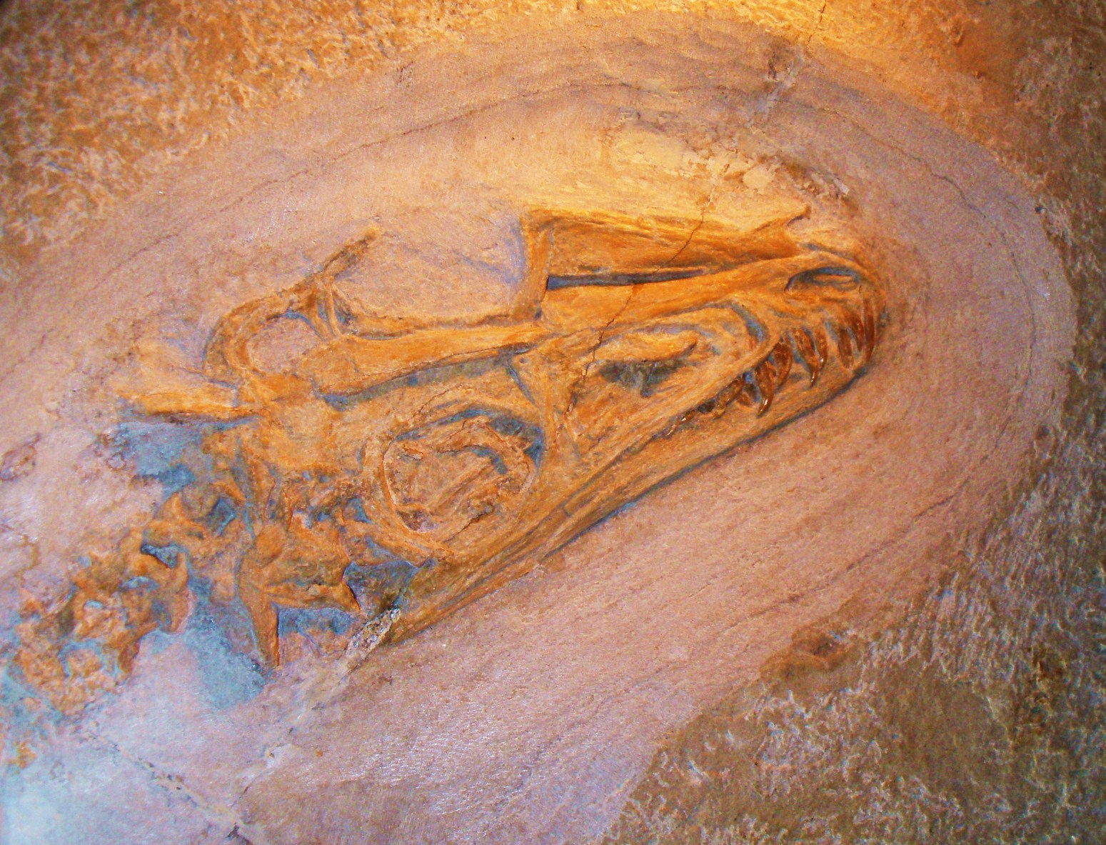 Fossil of Juravenator, an extinct theropod- Took the photo at Fossil Show, Munich